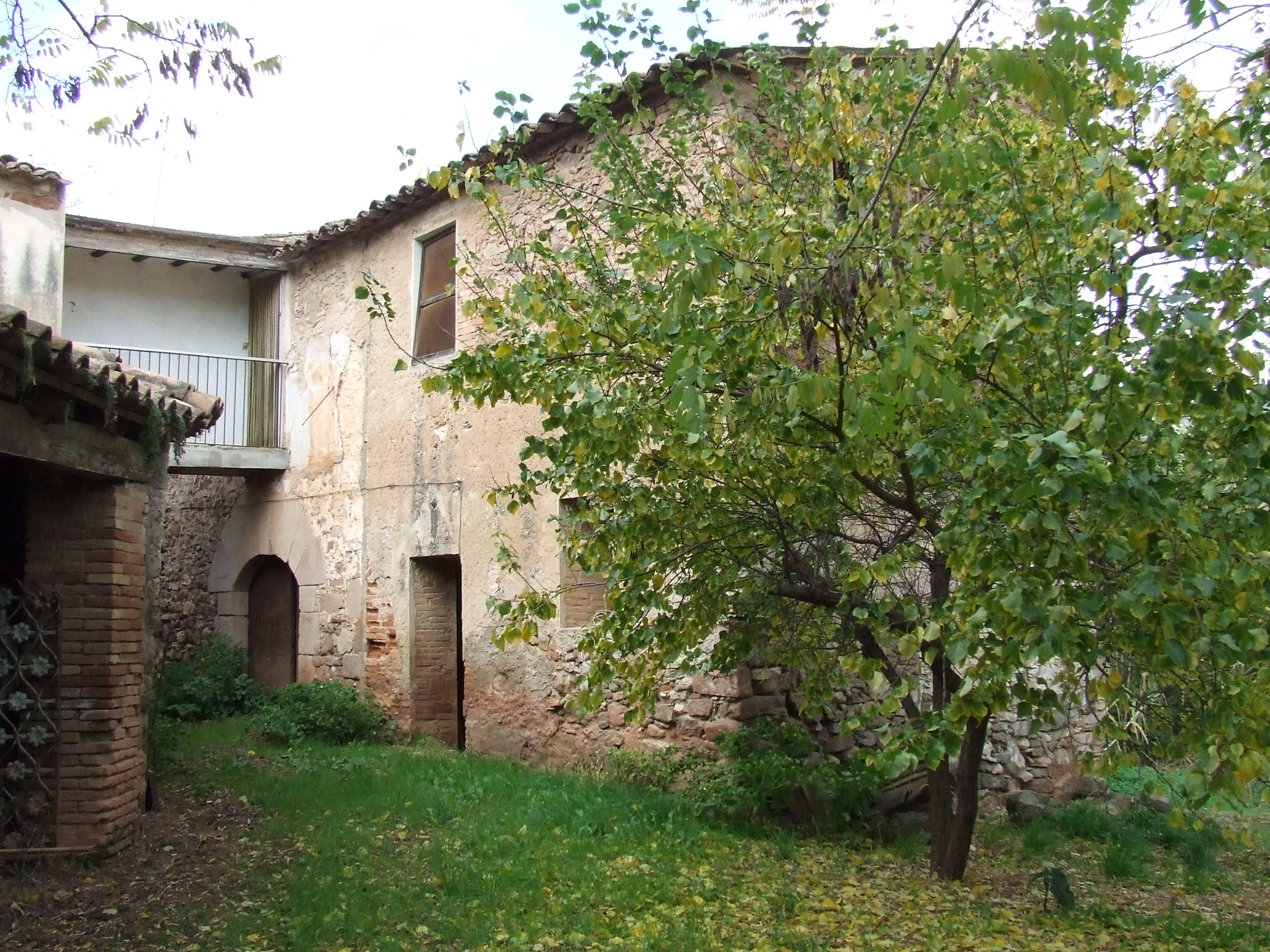 Molí de Can Camp (Riells del Fai, Bigues i Riells, Vallès Oriental)